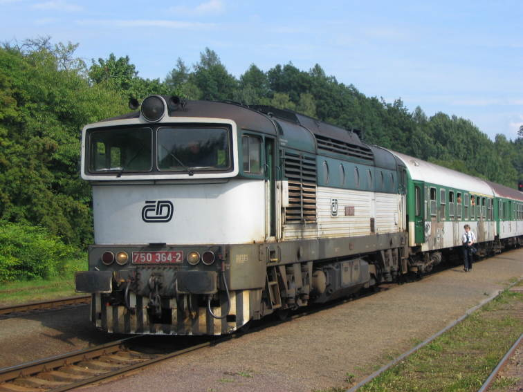 Lokomotiva řady 750, stanice Starkoč